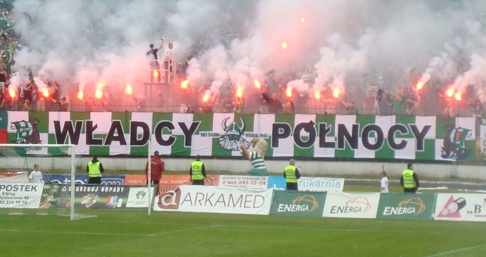 Lechia Gdansk Wladcy Polnocy